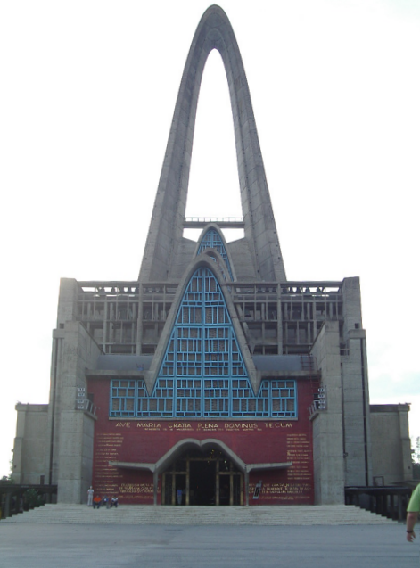 Catedral de La Altagracia.